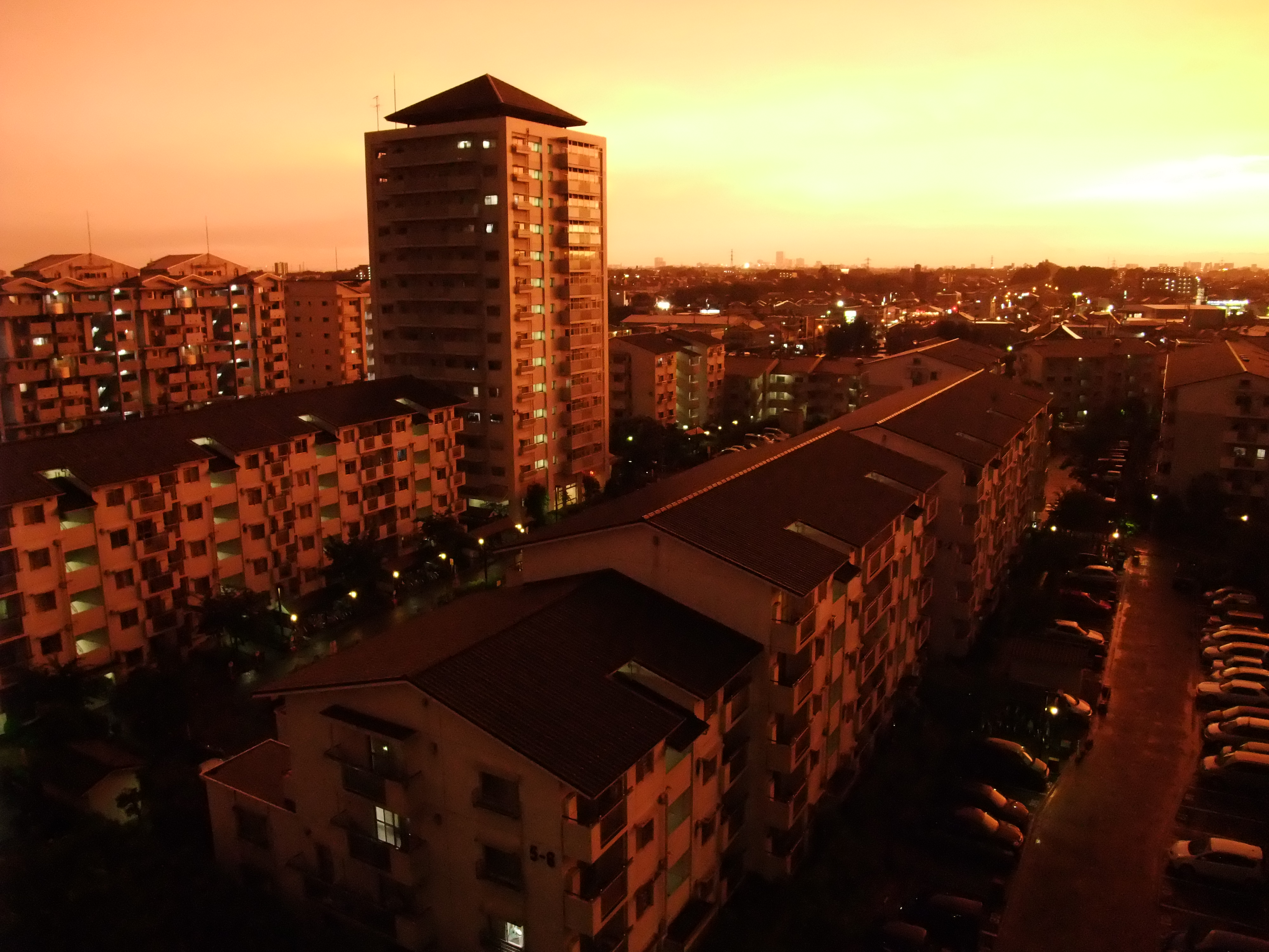 アーバンみらいの夕暮れ